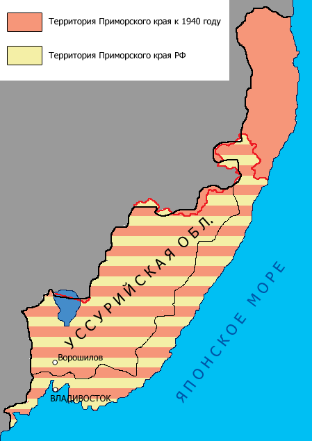 Карта территории Приморского края к 1940 году